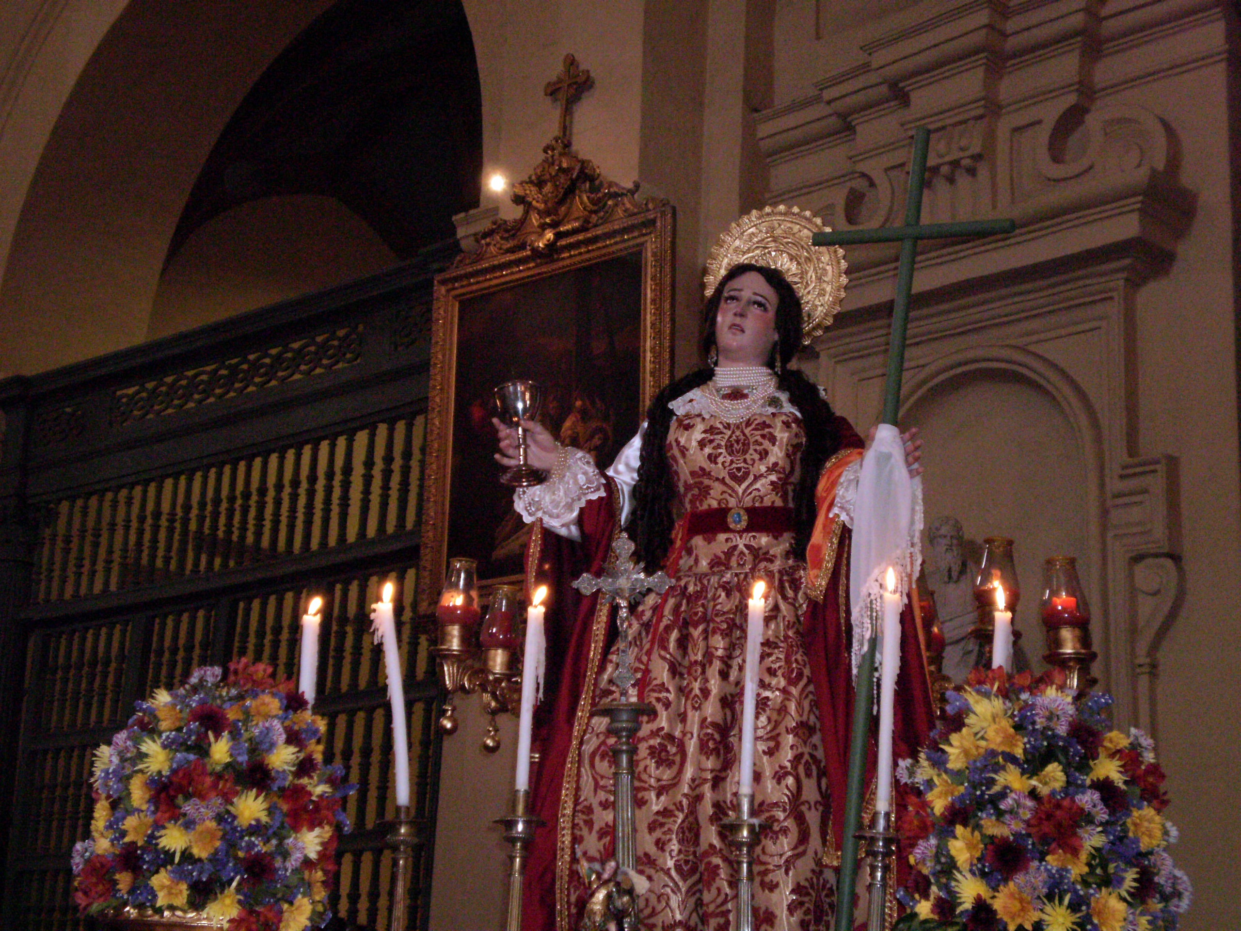 Venturosa Santa María Magdalena, patrona de la cofradía Venturosa Santa María Magdalena y Glorioso San Miguel Arcángel.